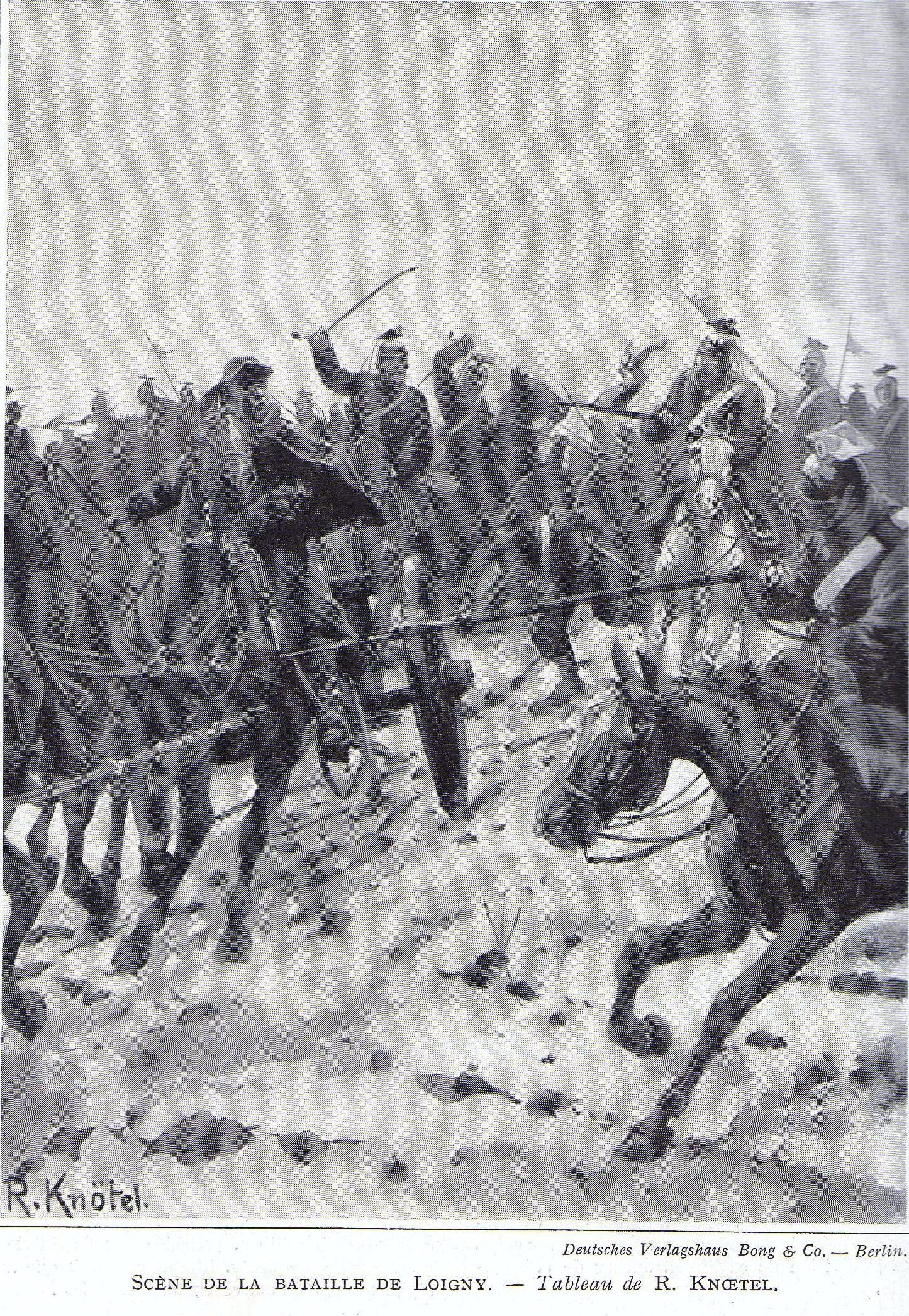 Épisode de la bataille de Loigny. Tableau de Richard Knoetel.